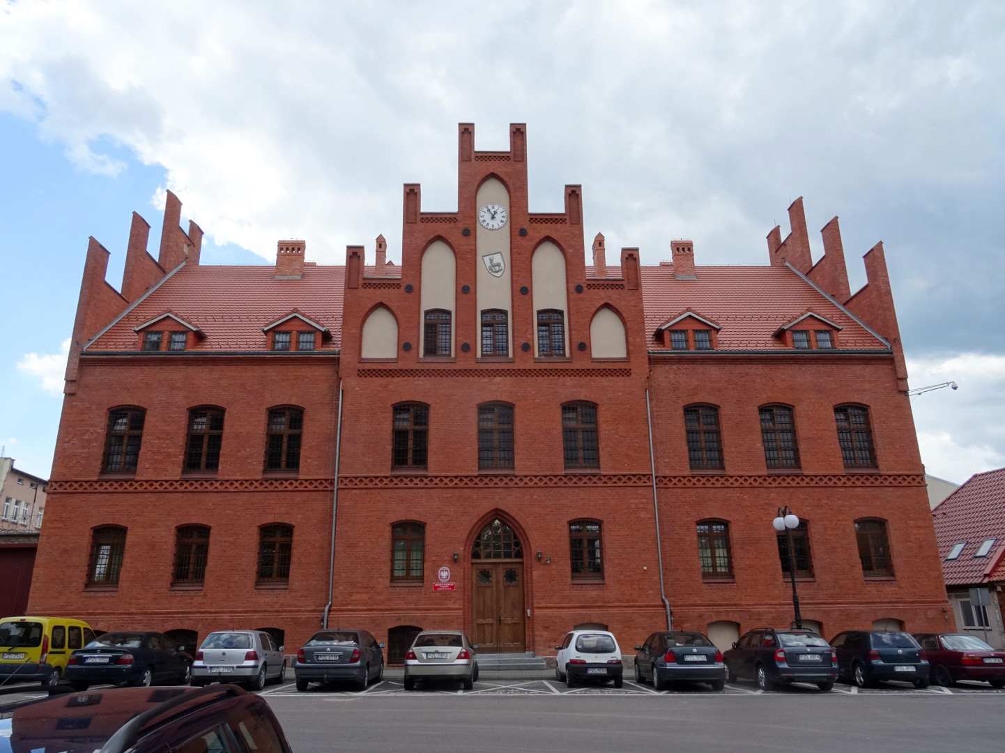 Areszt w Złotowie